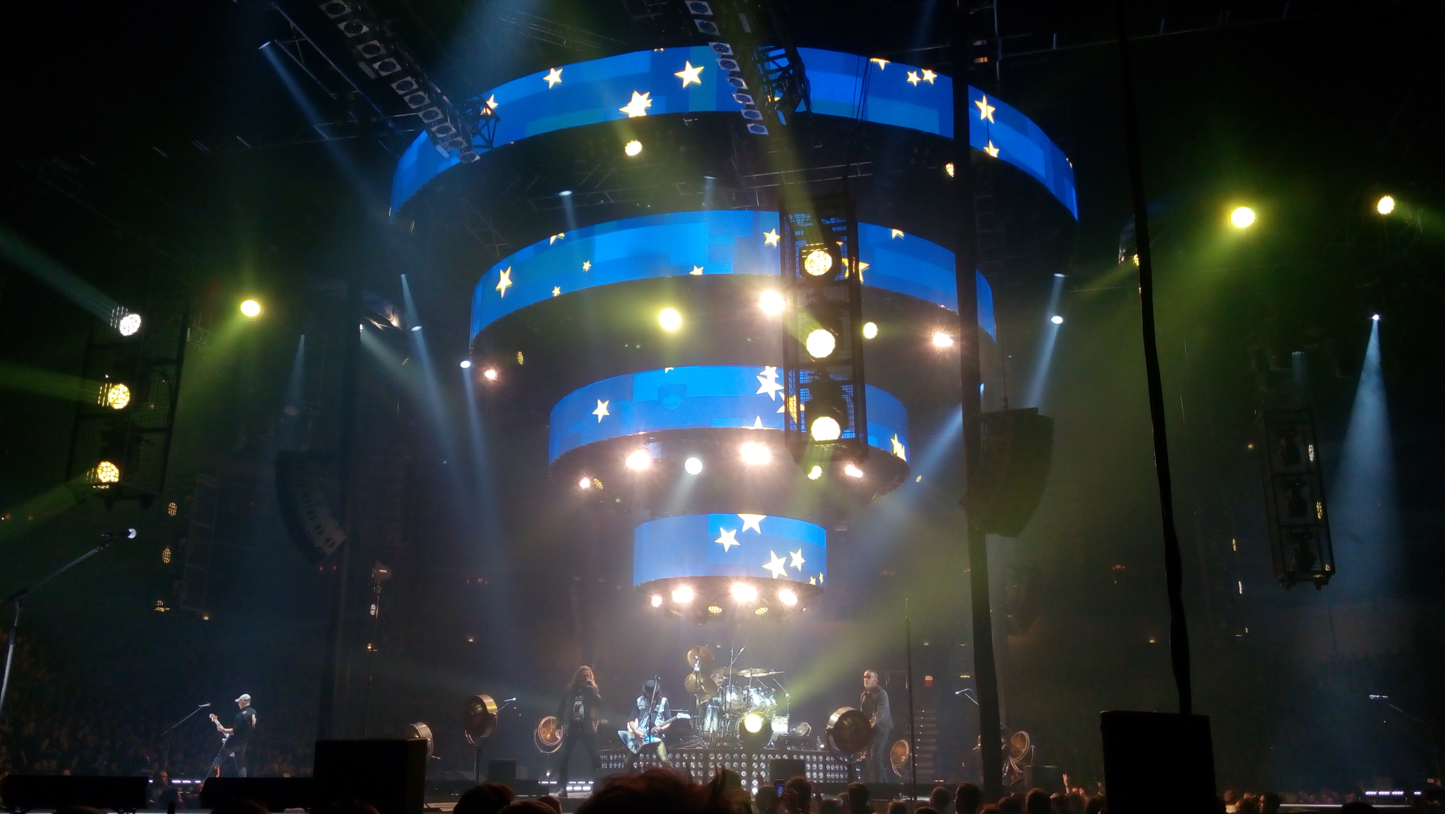 Skupina Kabát během vyprodaného koncertu v pražské O2 areně 28. 11. 2017